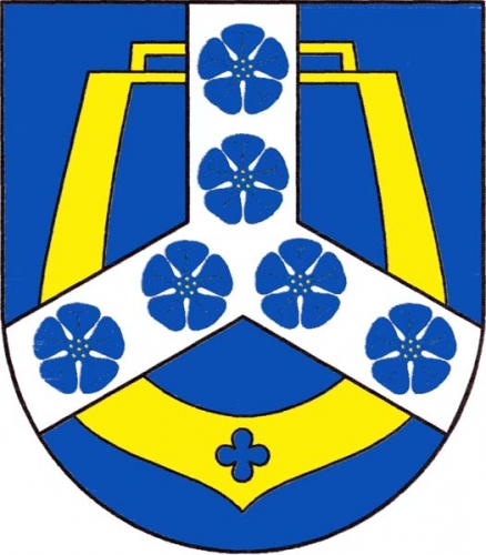 znak, Jívka, okres Trutnov